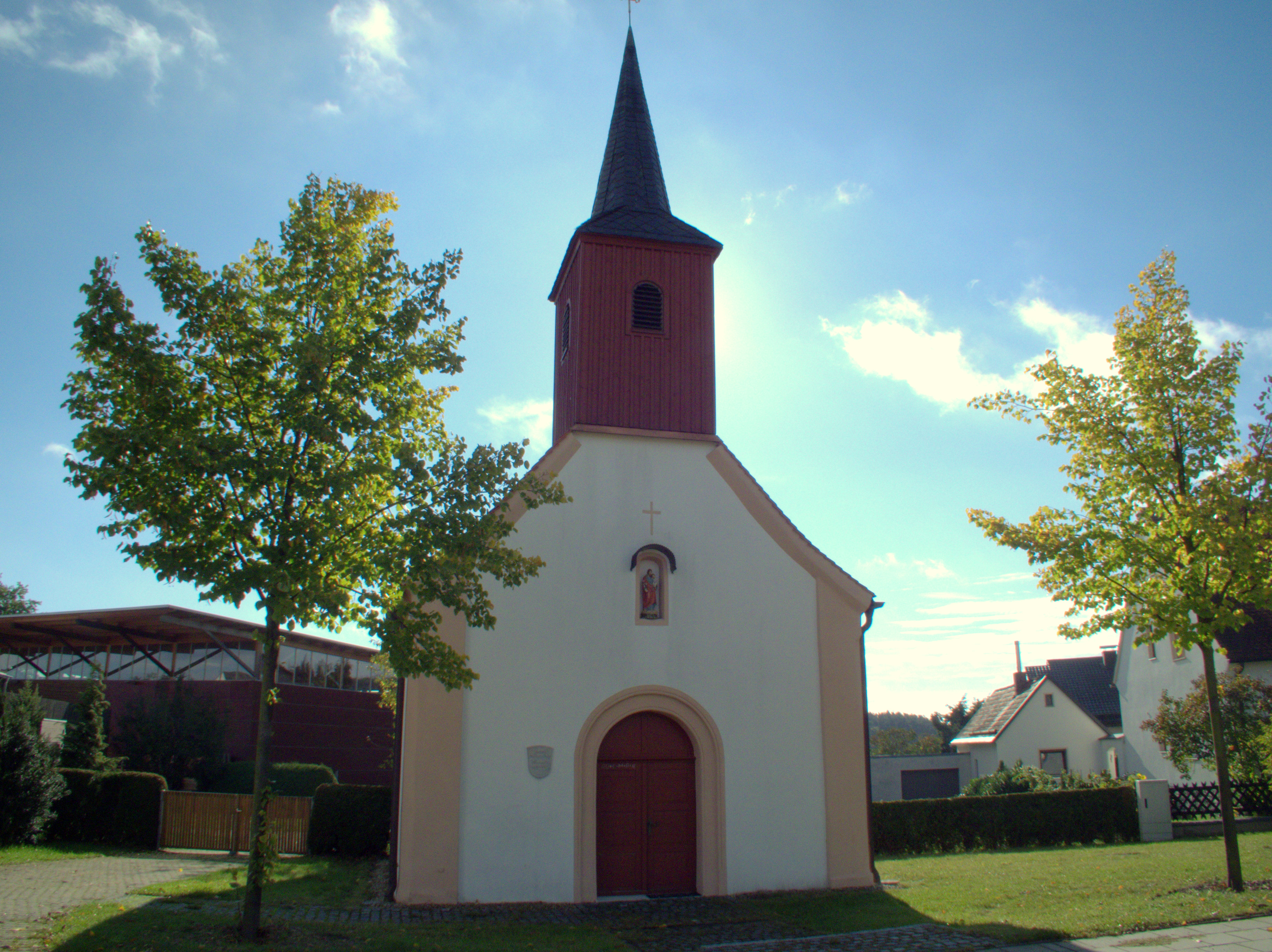 Die alte Dorfkapelle zur unbefleckten Empfängnis Mariä im Ortsteil Stauf in der Oberpfälzer Stadt Neumarkt